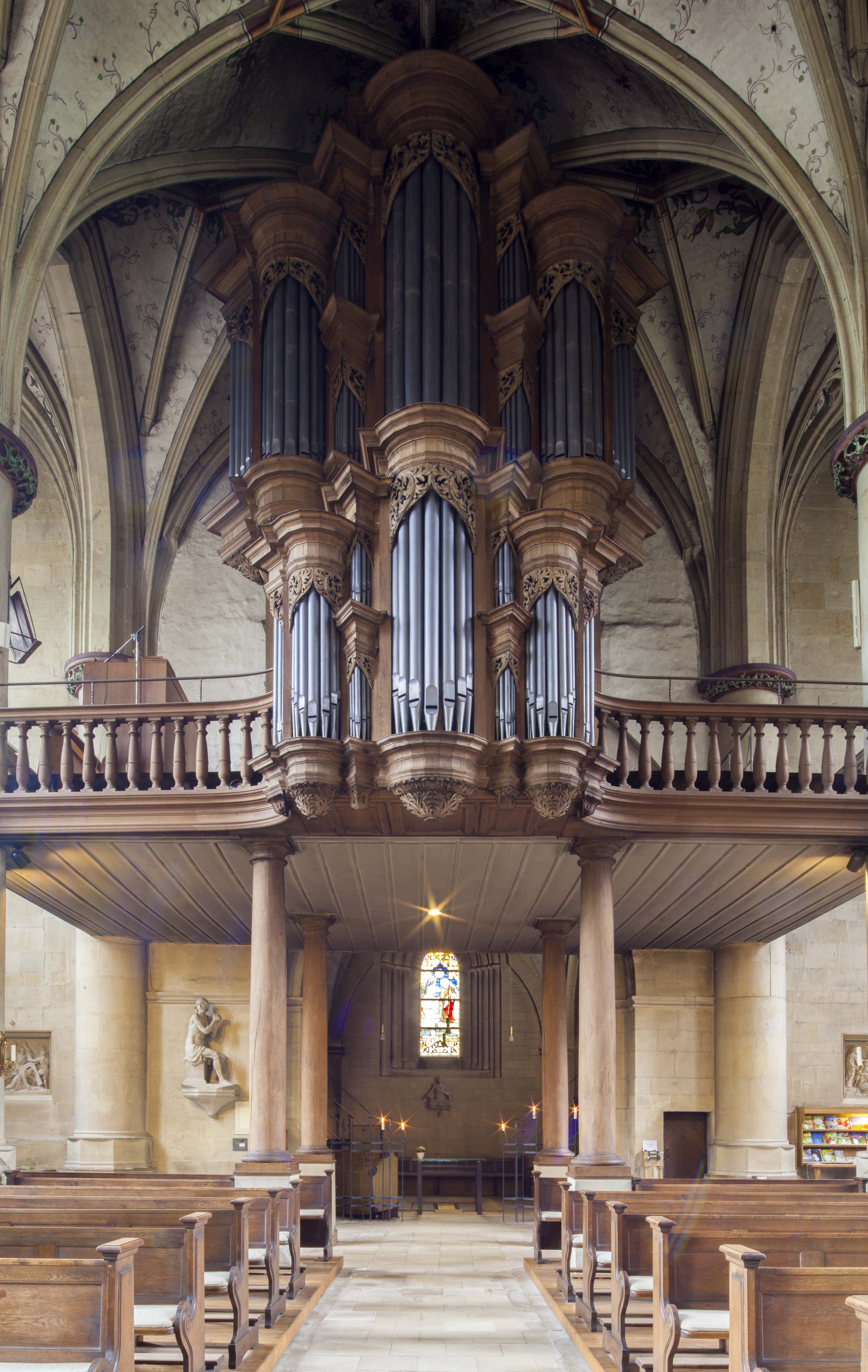 Nottuln Orgel zentral